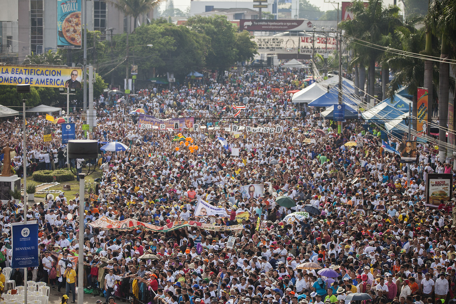 San Salvador (El Salvador), 22 de mayo de 2015. En la Plaza Salvador del Mundo se llevó a cabo la Beatificación de Monseñor Oscar Arnulfo Romero, asesinado el 24 de marzo de 1980 mientras celebraba la misa en la Capilla del Hospital La Divina Providencia. Foto: Luis Astudillo C. / Cancillería